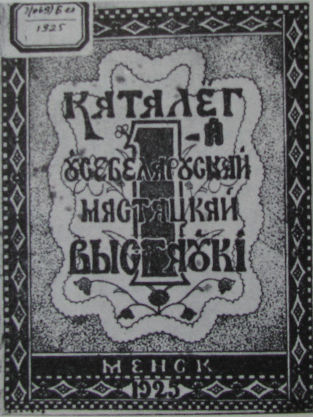 Вокладка каталога першай Усебеларускай мастацкай выстаукi. 1925 г.